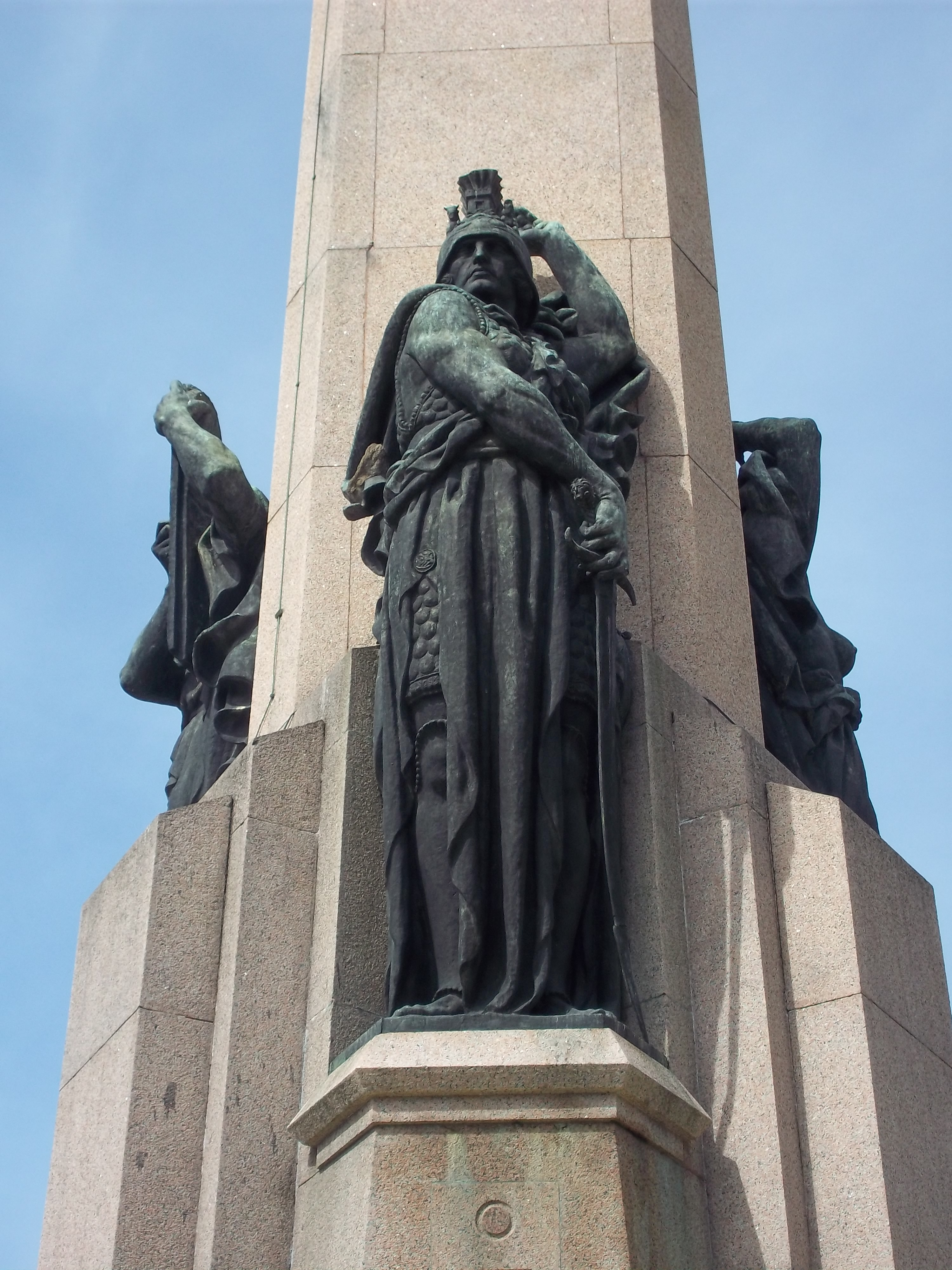 Estatua que representa la Fuerza. Obelisco de Montevideo, Uruguay.